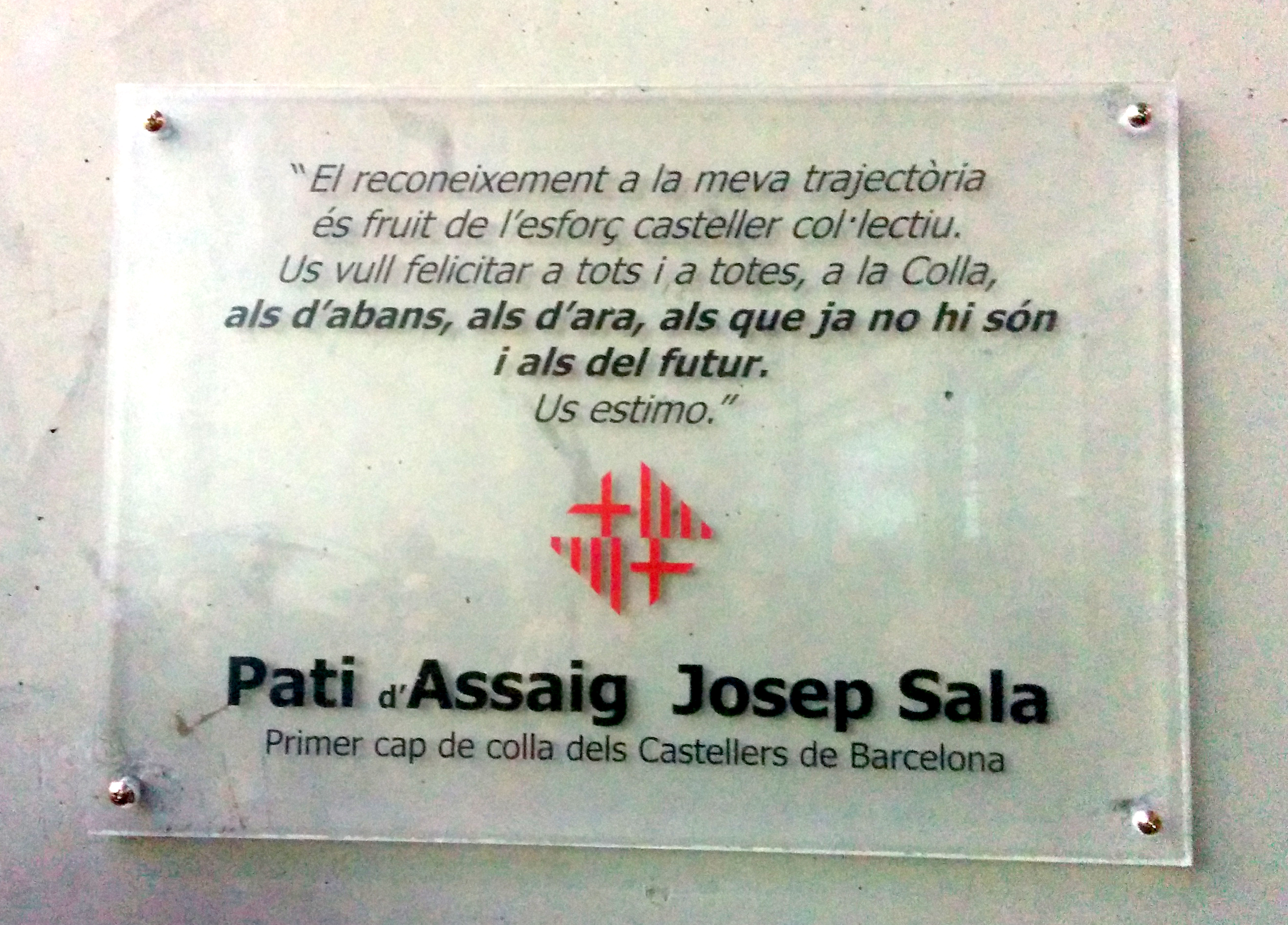 Placa en homenatge a Josep Sala, un dels fundadors i primr cap de Colla dels Castellers de Barcelona. Inaugurada el 8 de febrer de 2015.